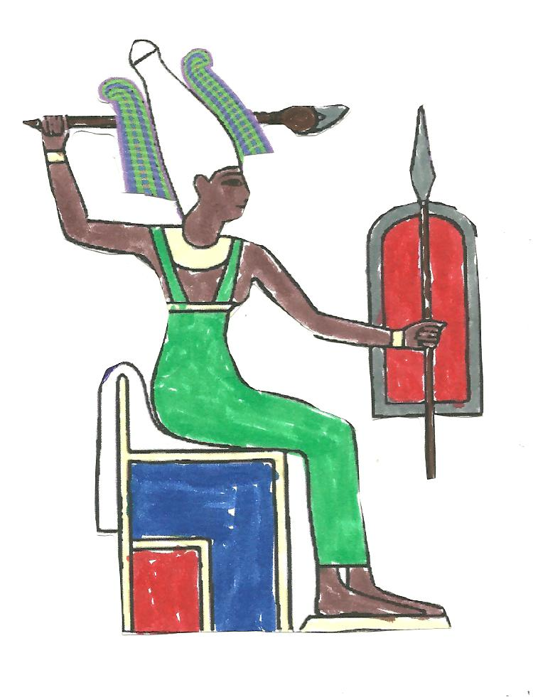 La Dea Anat Nāhuatl: Teotl Anat